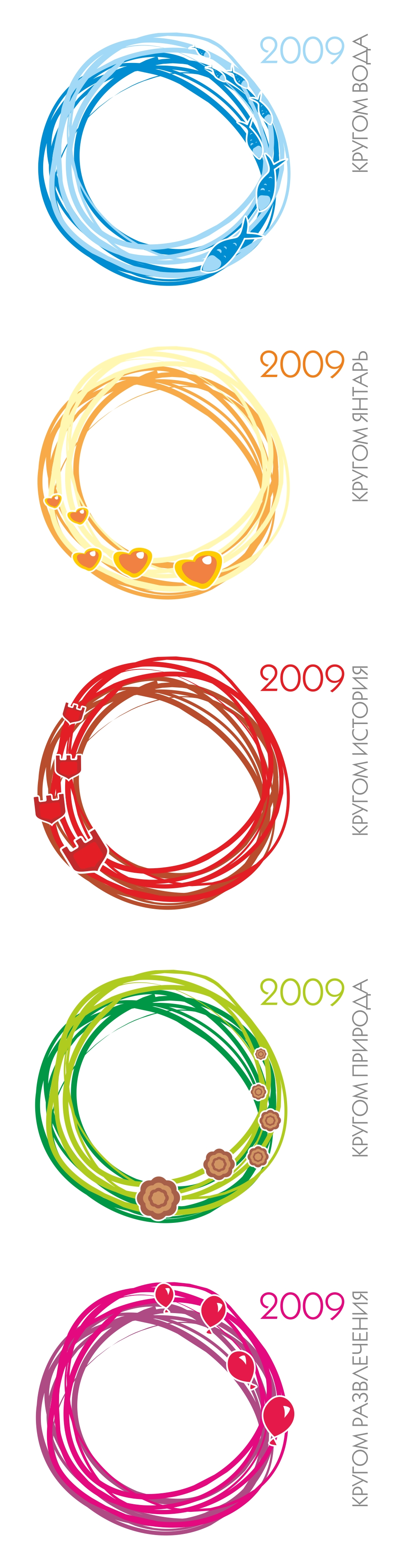 Концепция имиджевой графики: Калининградская область: архитектура имиджевой графики. Сегментирование общего штампа «Кругом впечатления».